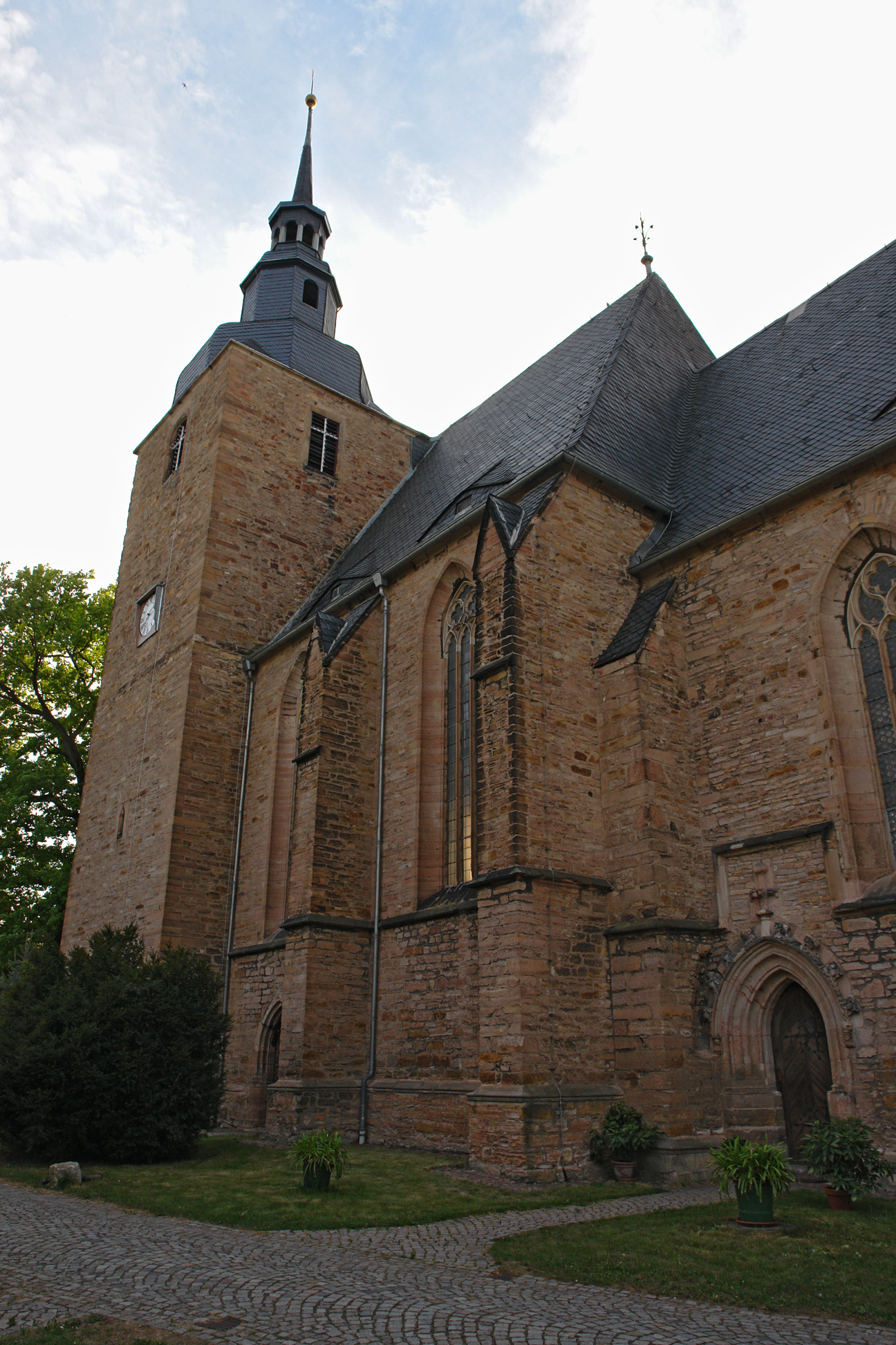 gemeint ist wohl: Deutschland, Sachsen (Bundesland), Chemnitz: Stiftskirche Ebersdorf (im Ortsteil Ebersdorf).